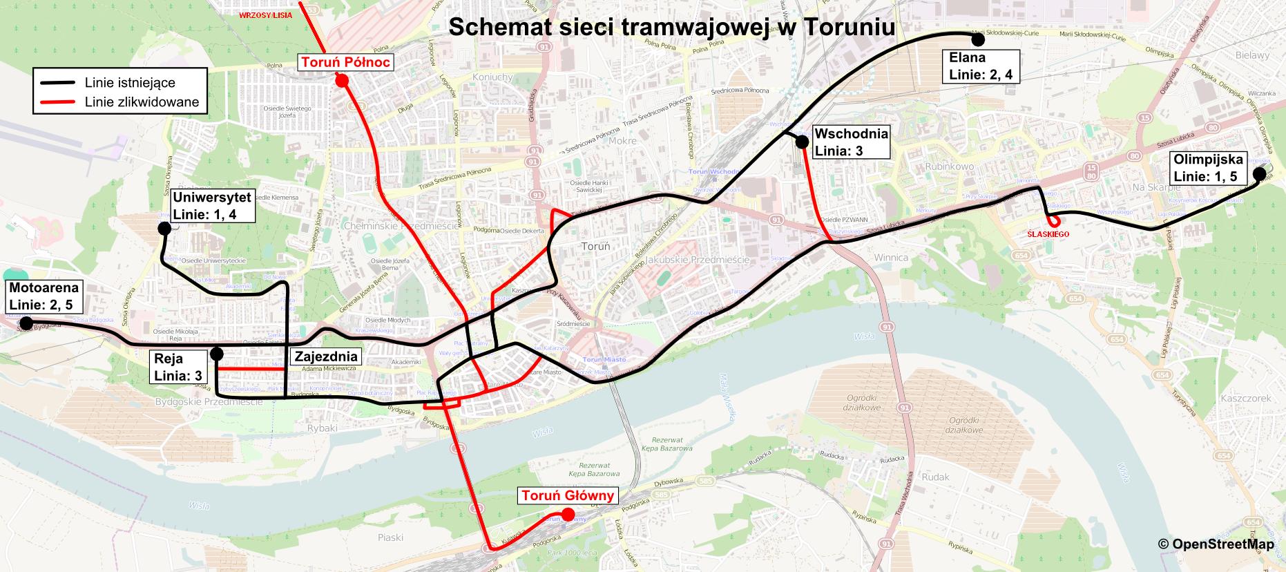 Siec tramwajowa w Toruniu-linie zlikwidowane